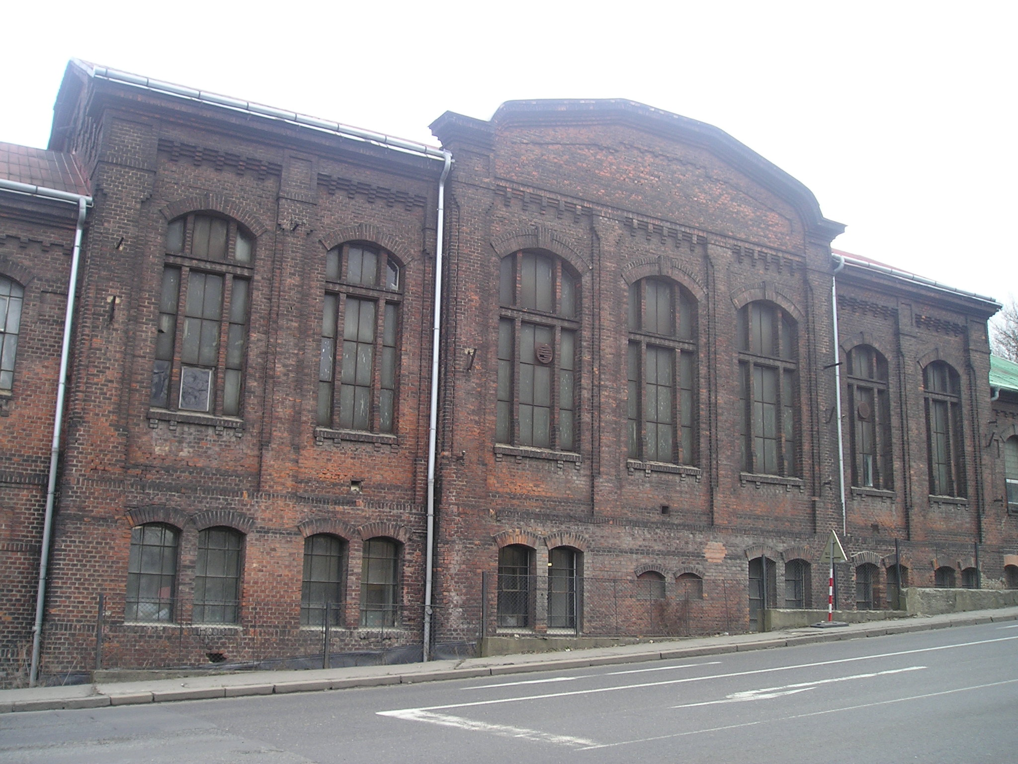 Česky: Uliční trakt dolu Trojice